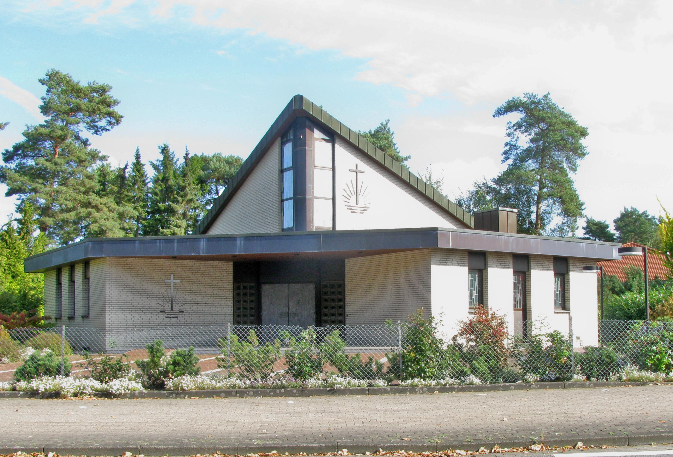 Die Neuapostolische Kirche in Hemmoor Warstade